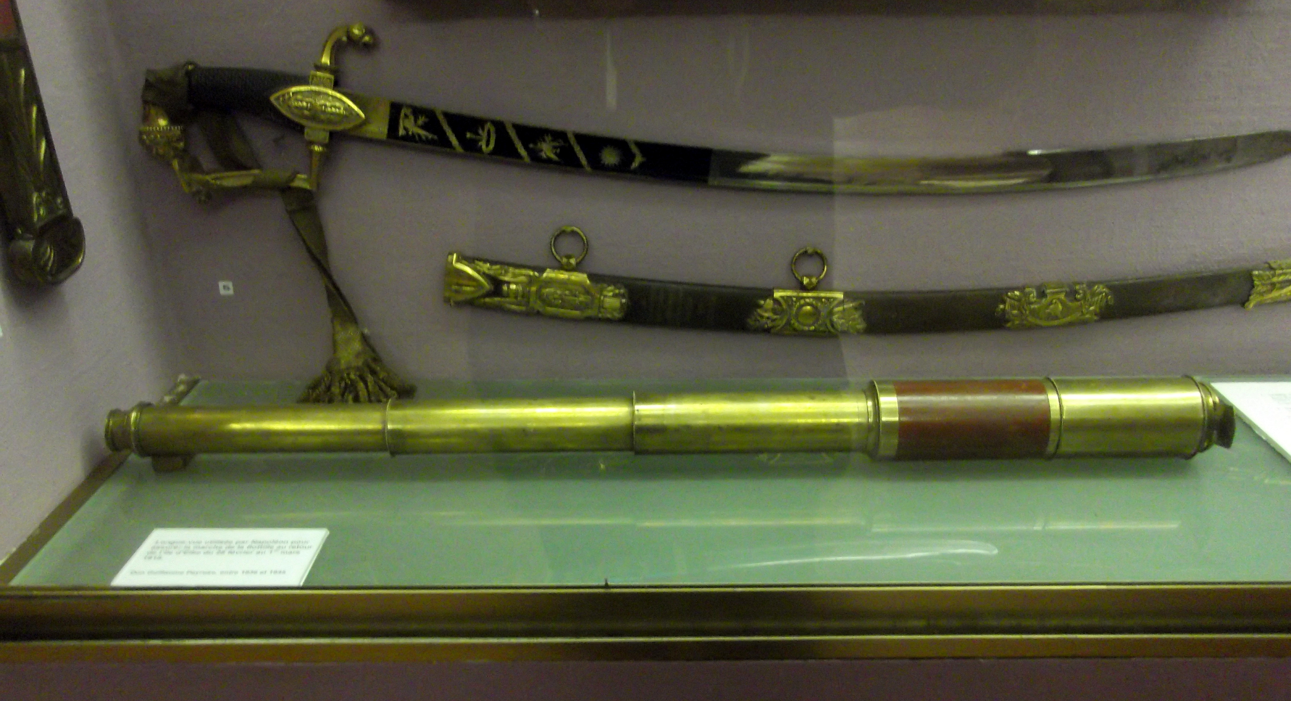 La longue-vue utilisée par Napoléon 1er en 1815 lors de son retour de l'île d'Elbe.